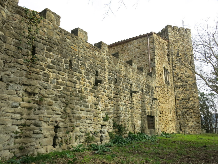 castell de Falgons, comarca del Pla de l'Estany / Catalunya